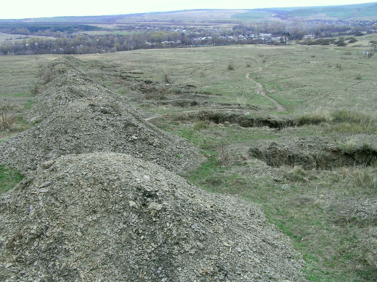 Іллірійський, Лутугинський район, Ілірійська сільська рада між с. Іллірія